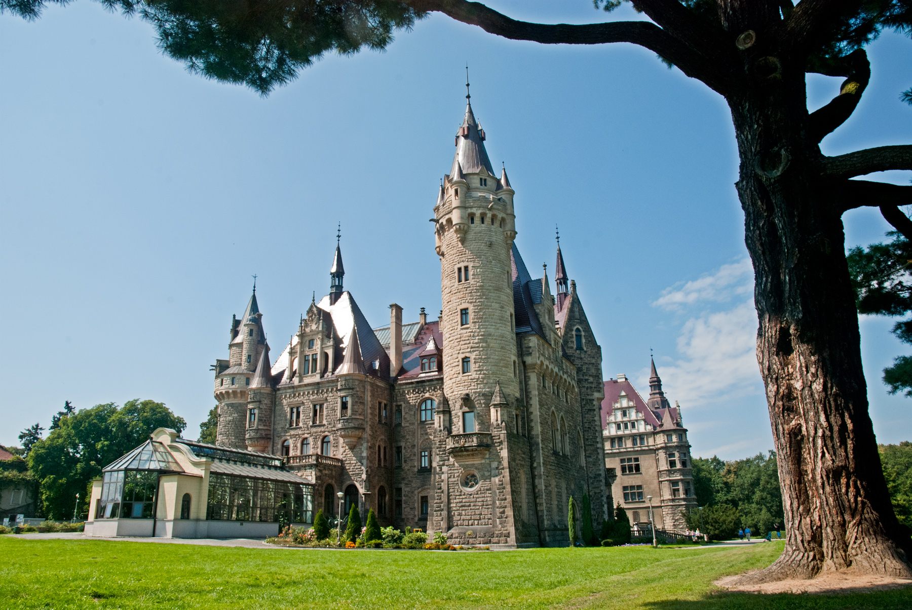 Zamek Moszna jest jednym z najpiękniejszych zamków w Polsce. Położony jest na Opolszczyźnie w miejscowości Moszna, która znajduje się w połowie drogi z Krapkowic do Prudnika. Według jednych źródeł nazwa wsi pochodzi od słowa moszna - w topografii oznaczającego dolinę, natomiast inne źródła informują, iż nazwa wsi związana jest z rodziną Moschin, która w XIV wieku przybyła w tę okolicę. Zamek Moszna w przeszłości należał do rodu Tiele-Wincklerów, a od roku 1972 aż po dzisiaj, w jego murach swoją działalność prowadzi Centrum Terapii Nerwic.